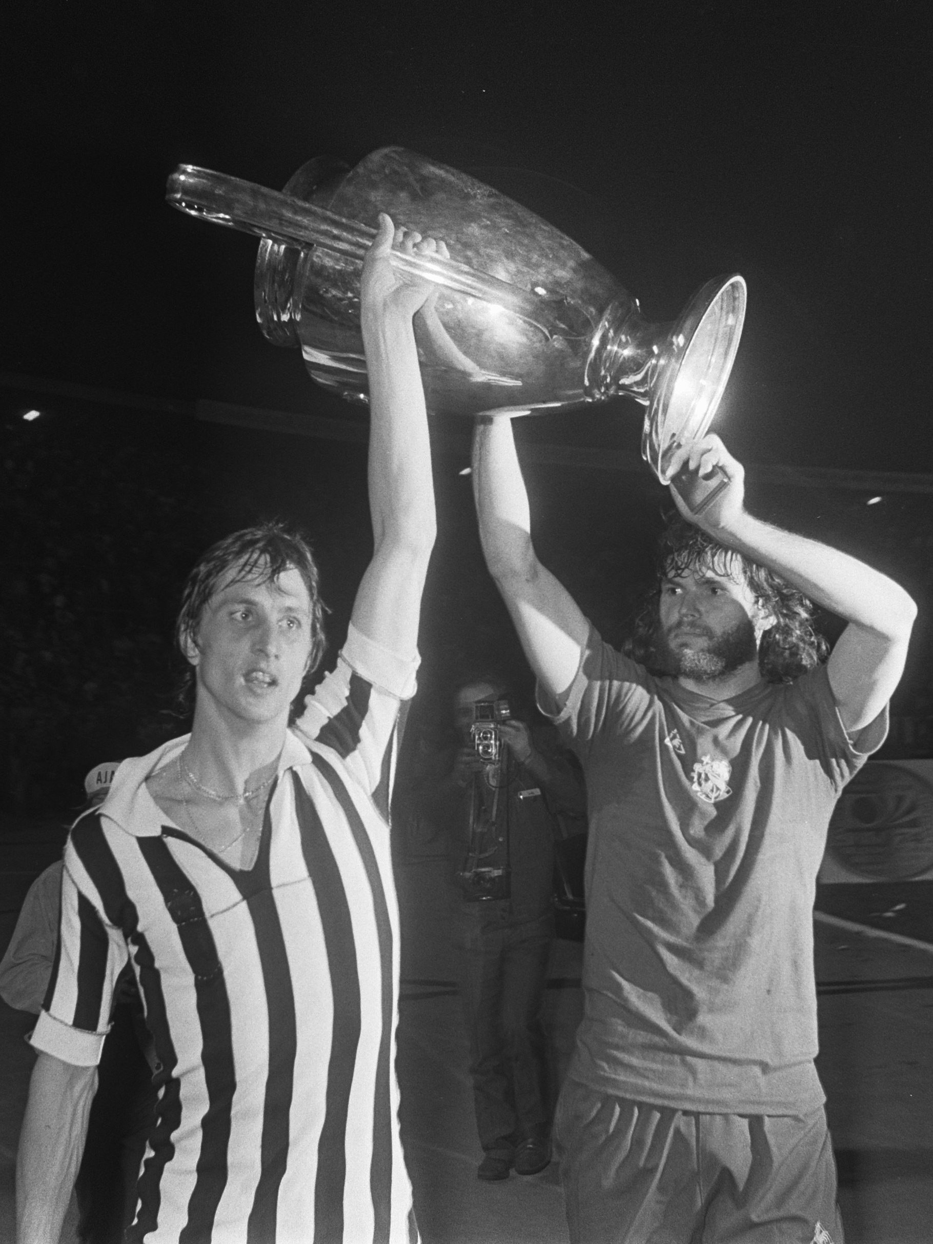 Collectie / Archief : Fotocollectie Anefo Reportage / Serie : [ onbekend ] Beschrijving : Finale Europacup I in Belgrado, Ajax tegen Juventus 1-0 Cruijff en Hulshoff (rechts) met de beker Datum : 30 mei 1973 Locatie : Belgrado Trefwoorden : sport, voetbal Persoonsnaam : Cruijff, Johan, Hulshoff, Juventus Fotograaf : Mieremet, Rob / Anefo Auteursrechthebbende : Nationaal Archief Materiaalsoort : Negatief (zwart/wit) Nummer archiefinventaris : bekijk toegang 2.24.01.05 Bestanddeelnummer : 926-4453